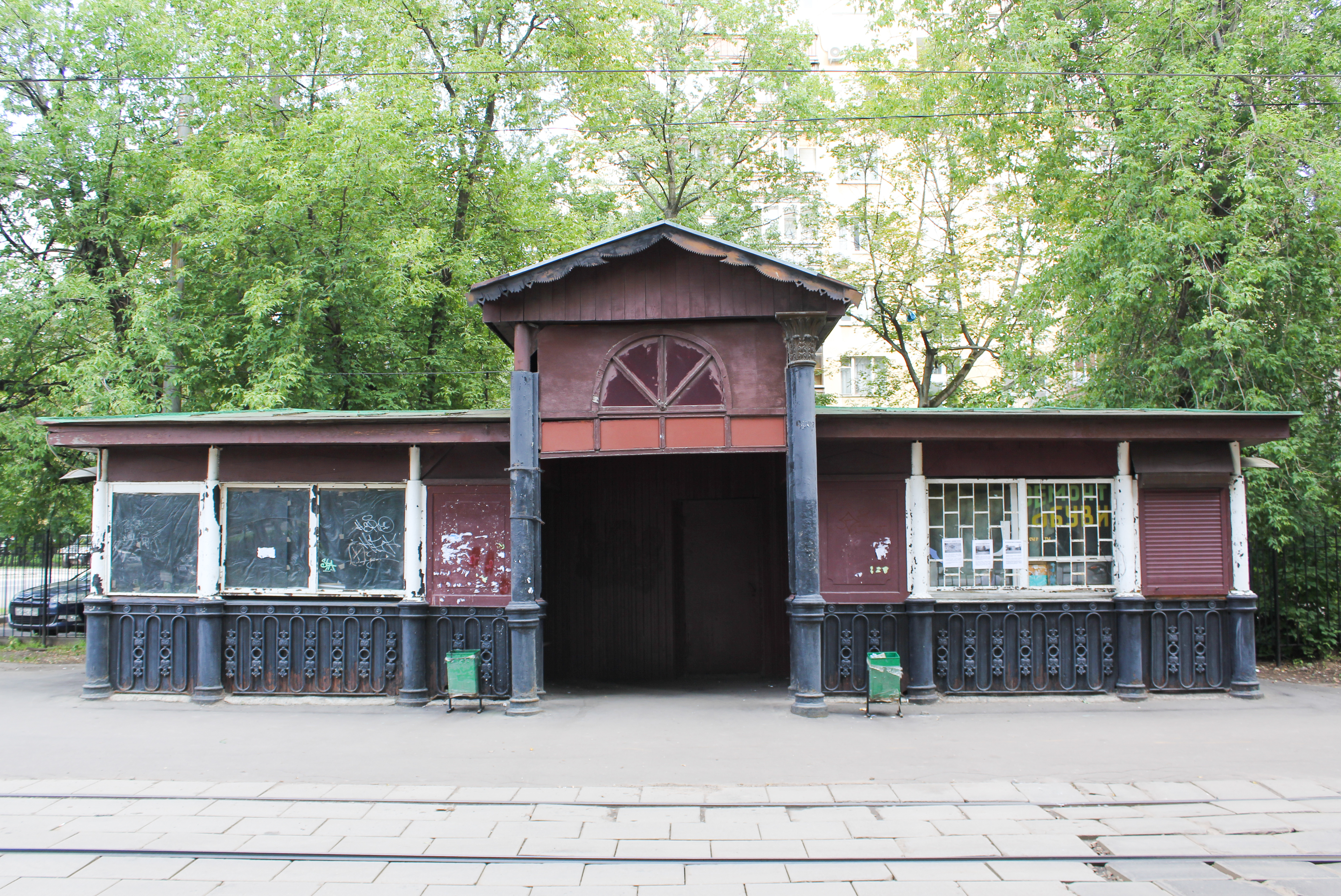 трамвайная остановка «Красностуденческий проезд» — вблизи Красностуденческого проезда (построена в конце XIX века по проекту архитектора Ф. А. Когновицкого, является старейшим павильоном наземного общественного транспорта в Москве